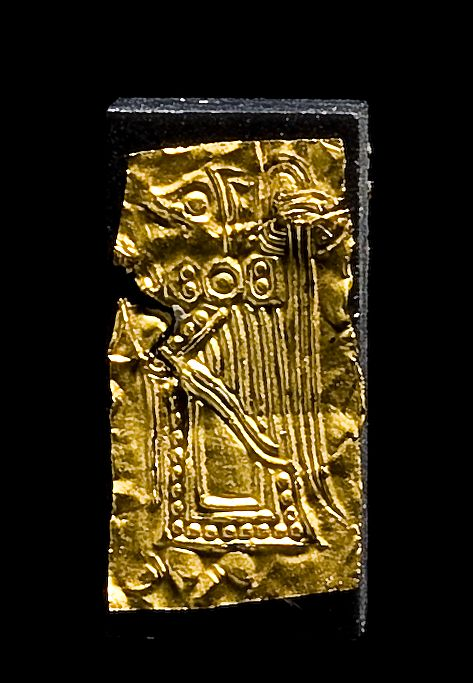 Guldgubbe med kvindefigur fra Gudme, Gudme sogn.